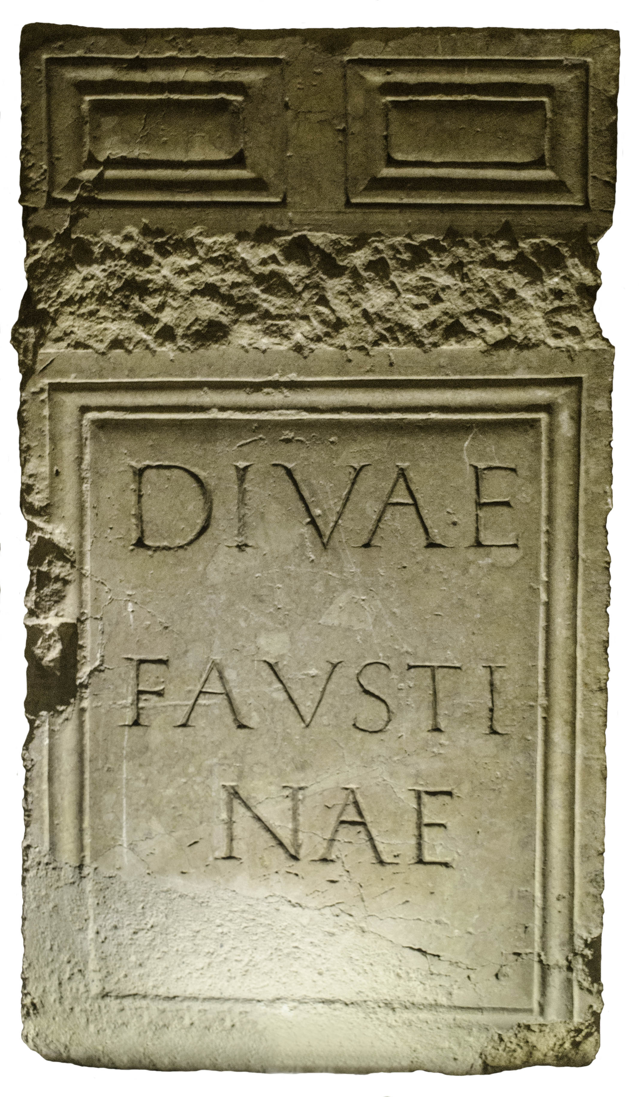 Monument à l’impératrice Faustine divinisée (Divae Faustinae), marbre, 141 - 176 ? Musée Eugène-Camoreyt, Lectoure, Gers, France